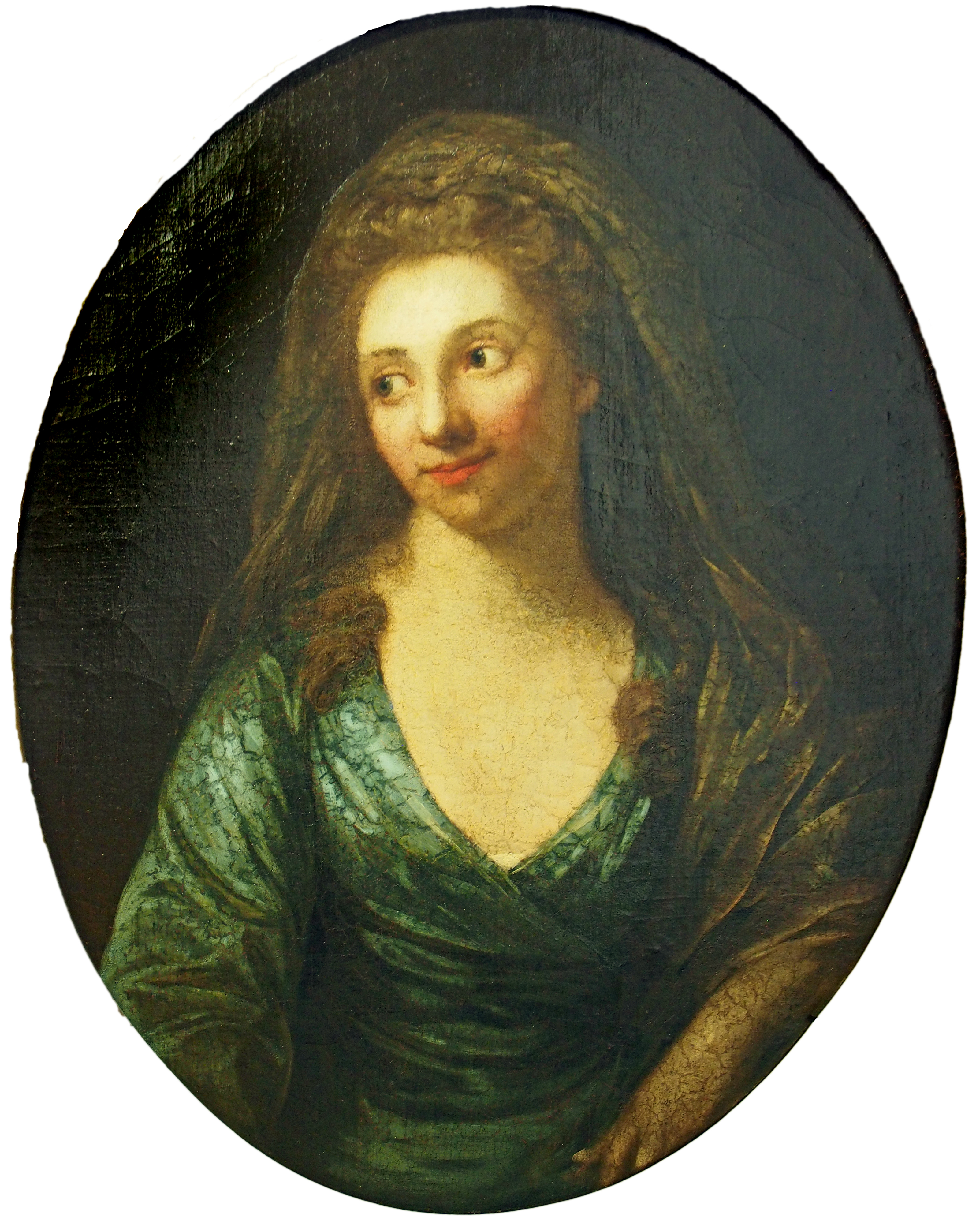 Graf Friedrich Leopold zu Stolberg-Stolbergs erste Ehefrau, Eheschließung 1782